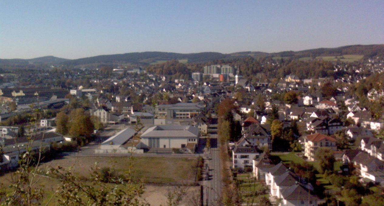 Attendorn, vom Dach der Atta-Höhle, Blickrichtung Westen